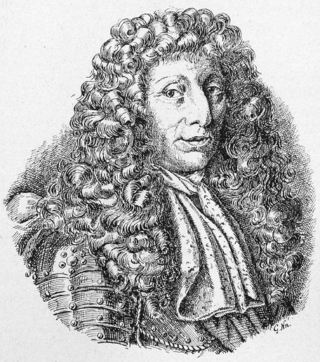 Jacques de Solleysel